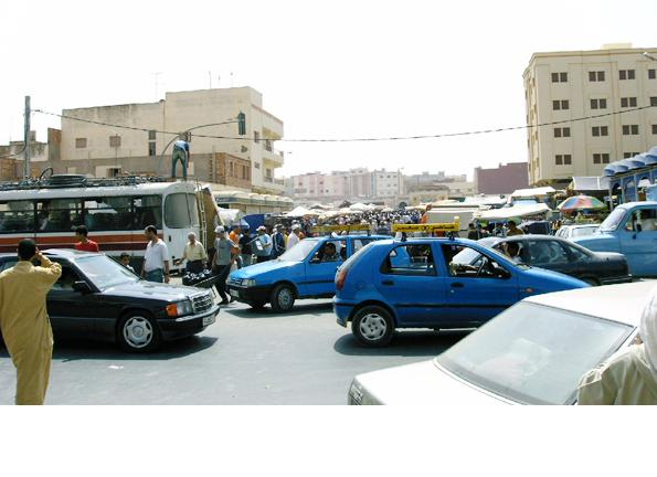 Arouit